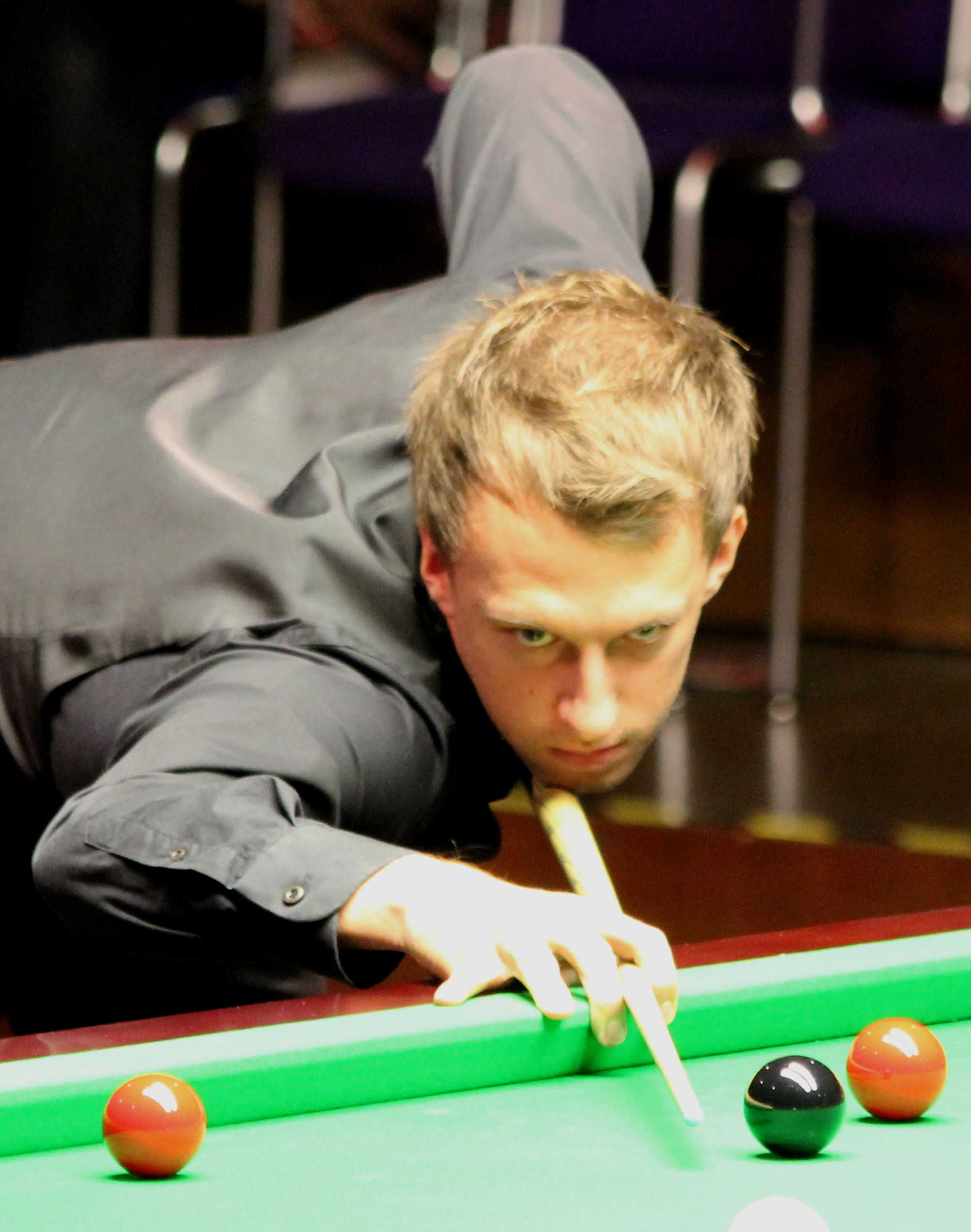 Judd Trump beim Paul Hunter Classic 2012